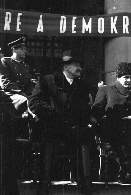 Veres Péter és Erdei Ferenc miniszterek